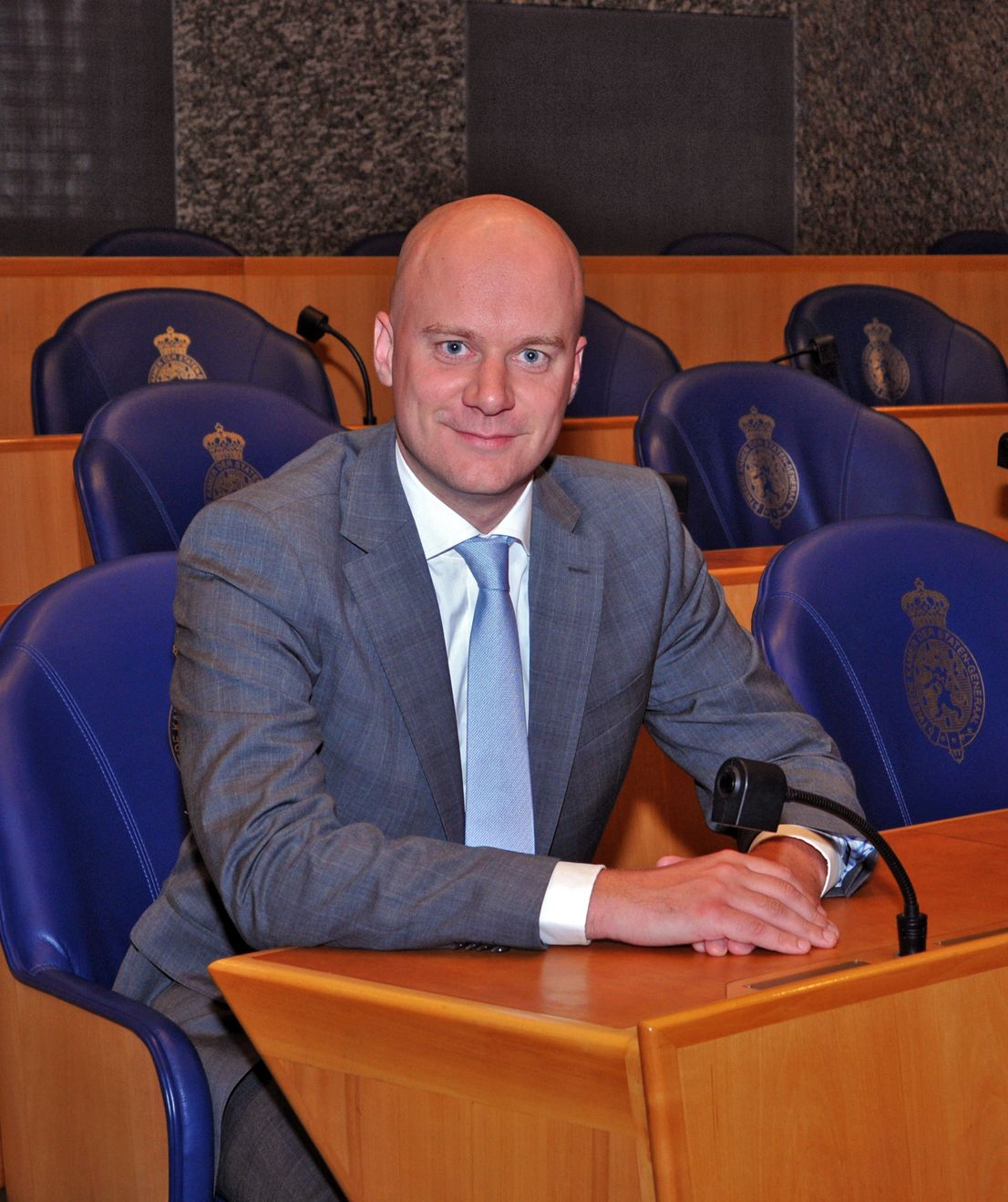 Johannes Henricus Antonius (Johan) Driessen (Cuijk en Sint Agatha, 4 juni 1981) is sinds 17 juni 2010 namens de Partij voor de Vrijheid (PVV) lid van de Tweede Kamer der Staten-Generaal.